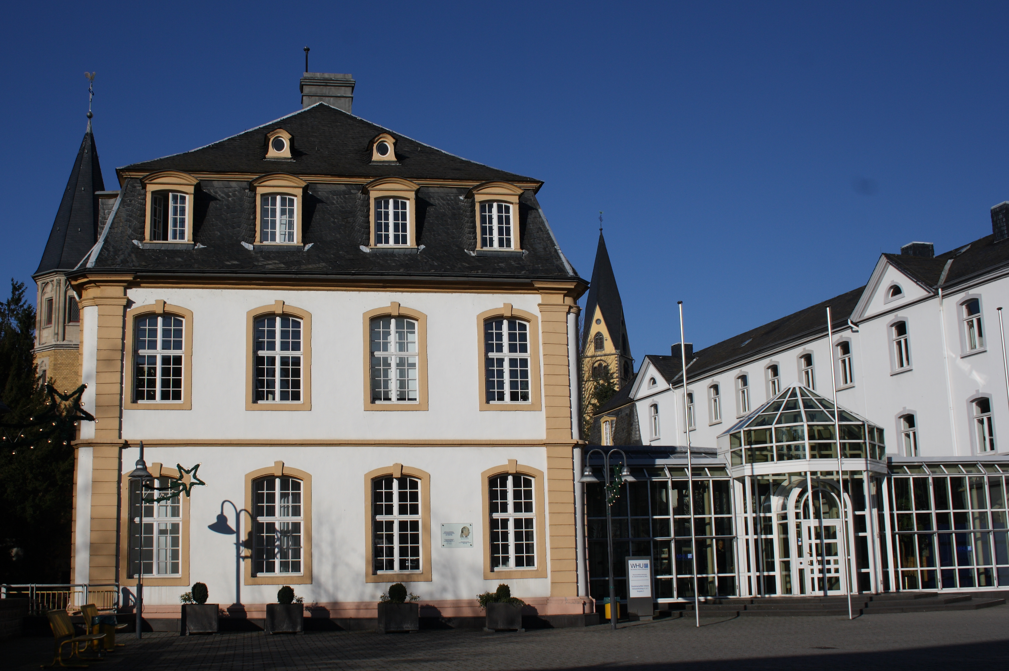 Marienburg in Vallendar im Landkreis Mayen-Koblenz (Rheinland-Pfalz), Heerstraße 52, jetzt Sitz der WHU – Otto Beisheim School of Management